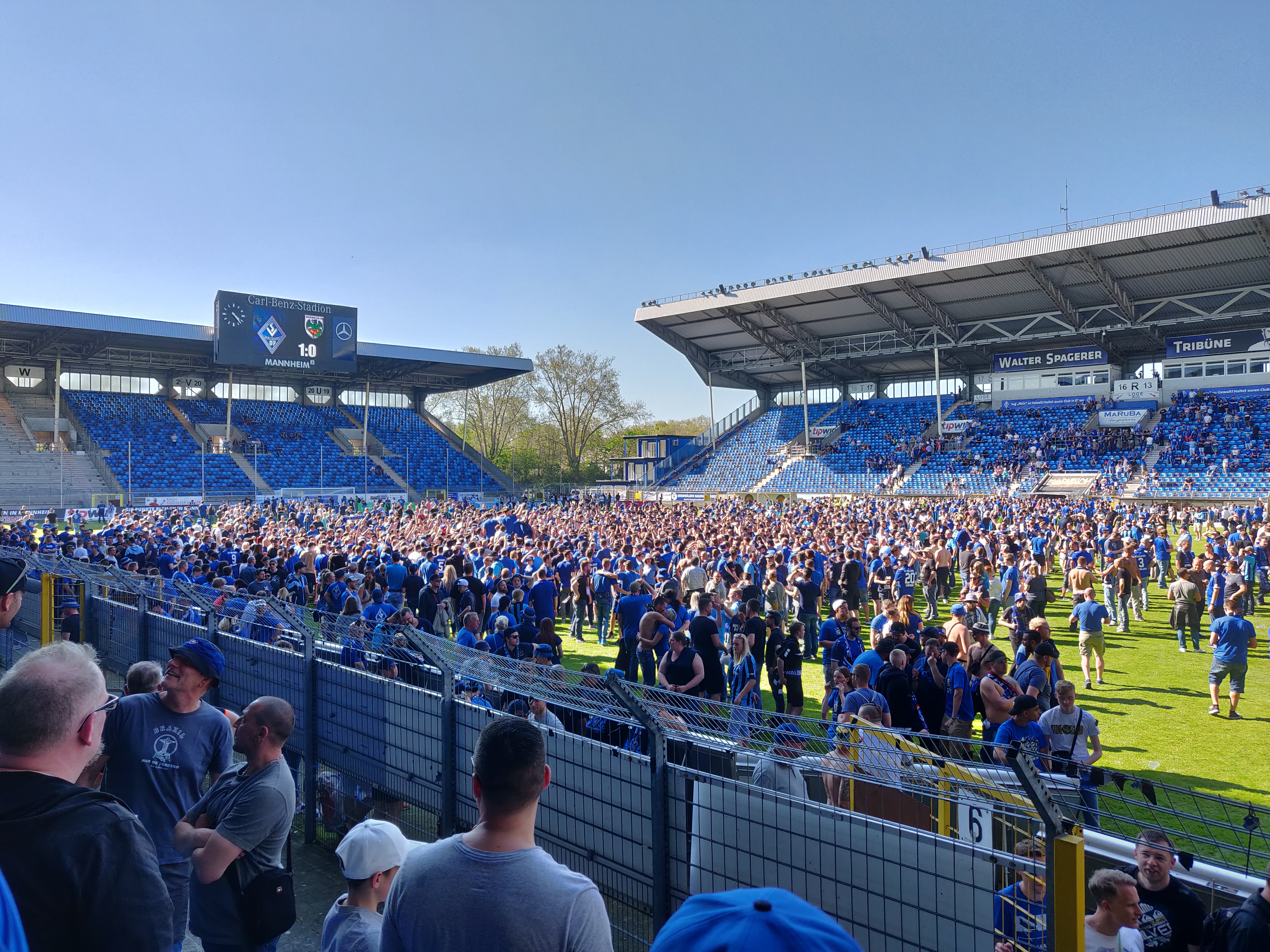 Aufstieg des SV Waldhof Mannheim in die 3. Liga, am 20. April 2019 nach dem 1:0 Heimsieg gegen Wormatia Worms. Feier im Carl-Benz-Stadion.